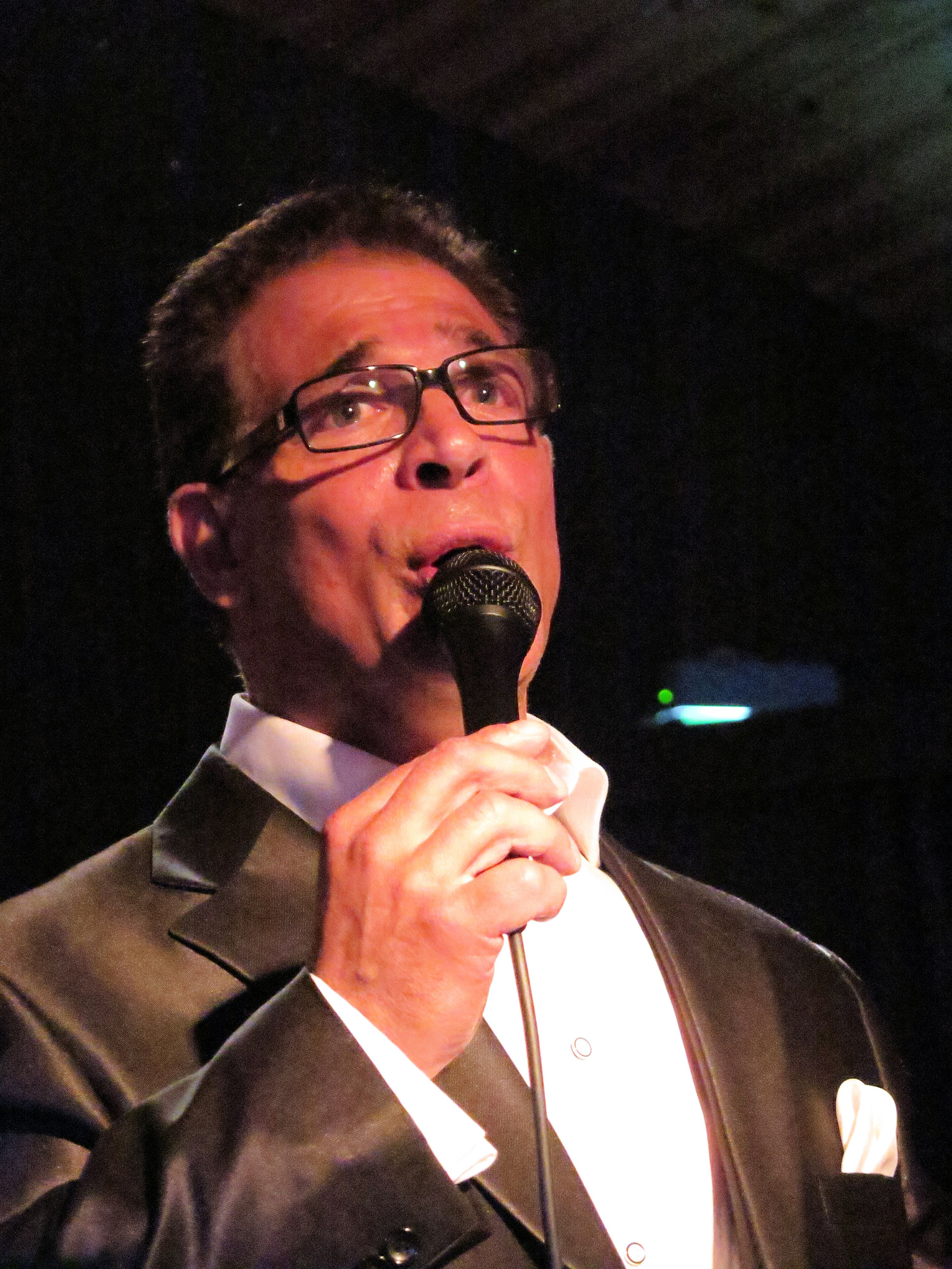 Dimitri Isberg suomalainen laulaja